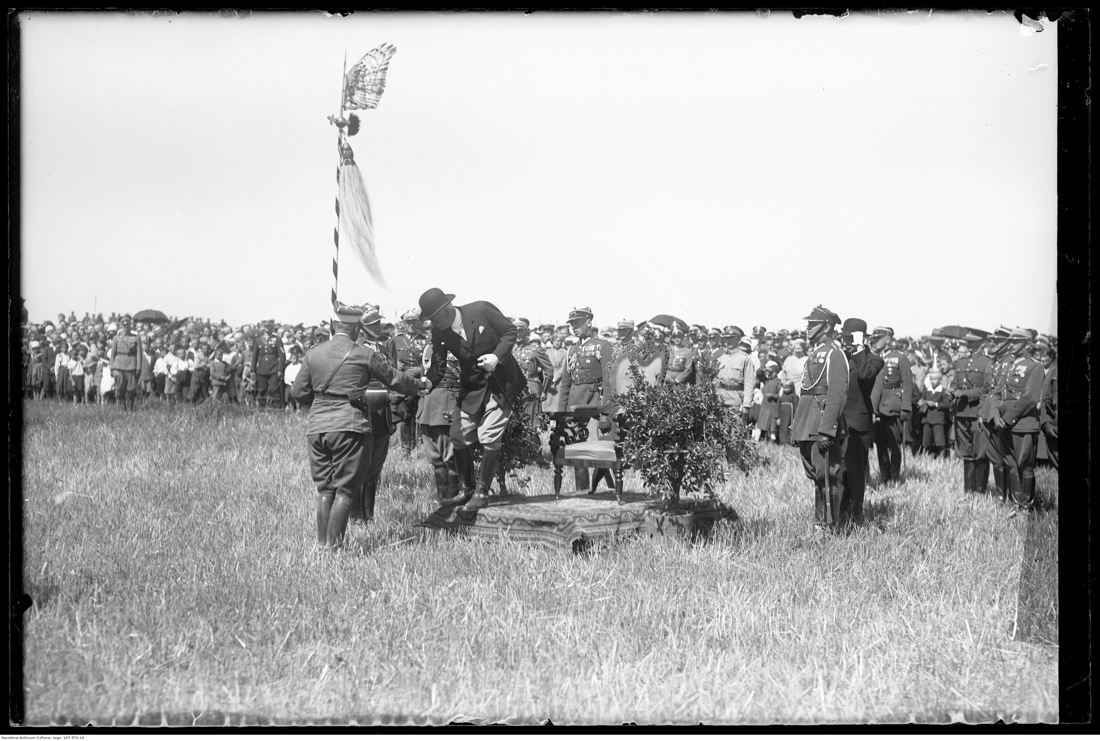 Prezydent Ignacy Mościcki gratuluje dowódcy 11 Pułku Ułanów płk. Stanisławowi Klepaczowi. Za płk Klepaczem gen. Bolesław Wieniawa-Długoszowski.